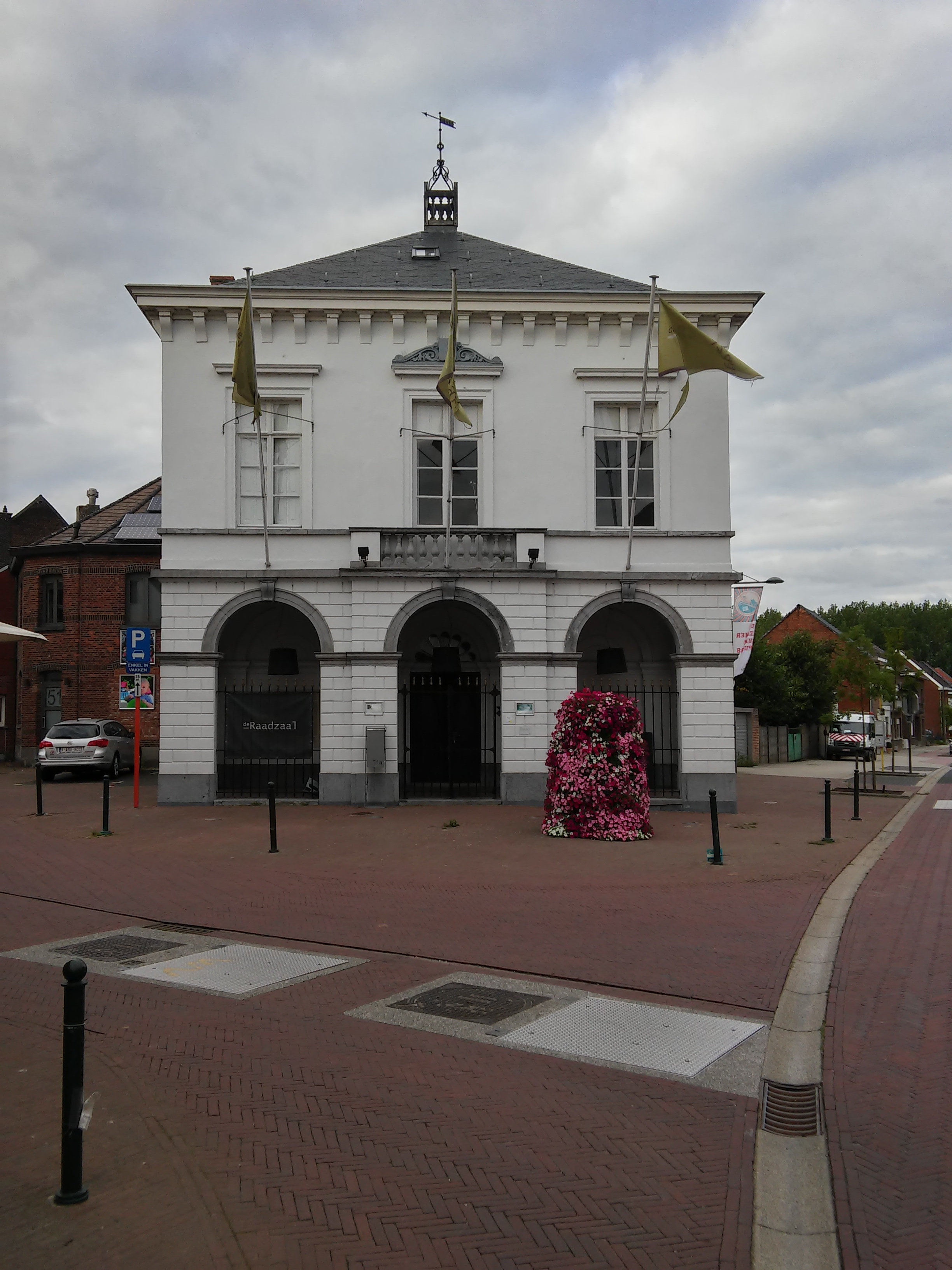 Museum De Bres, voormalig gemeentehuis, Ruisbroek-Dorp 49, Ruisbroek